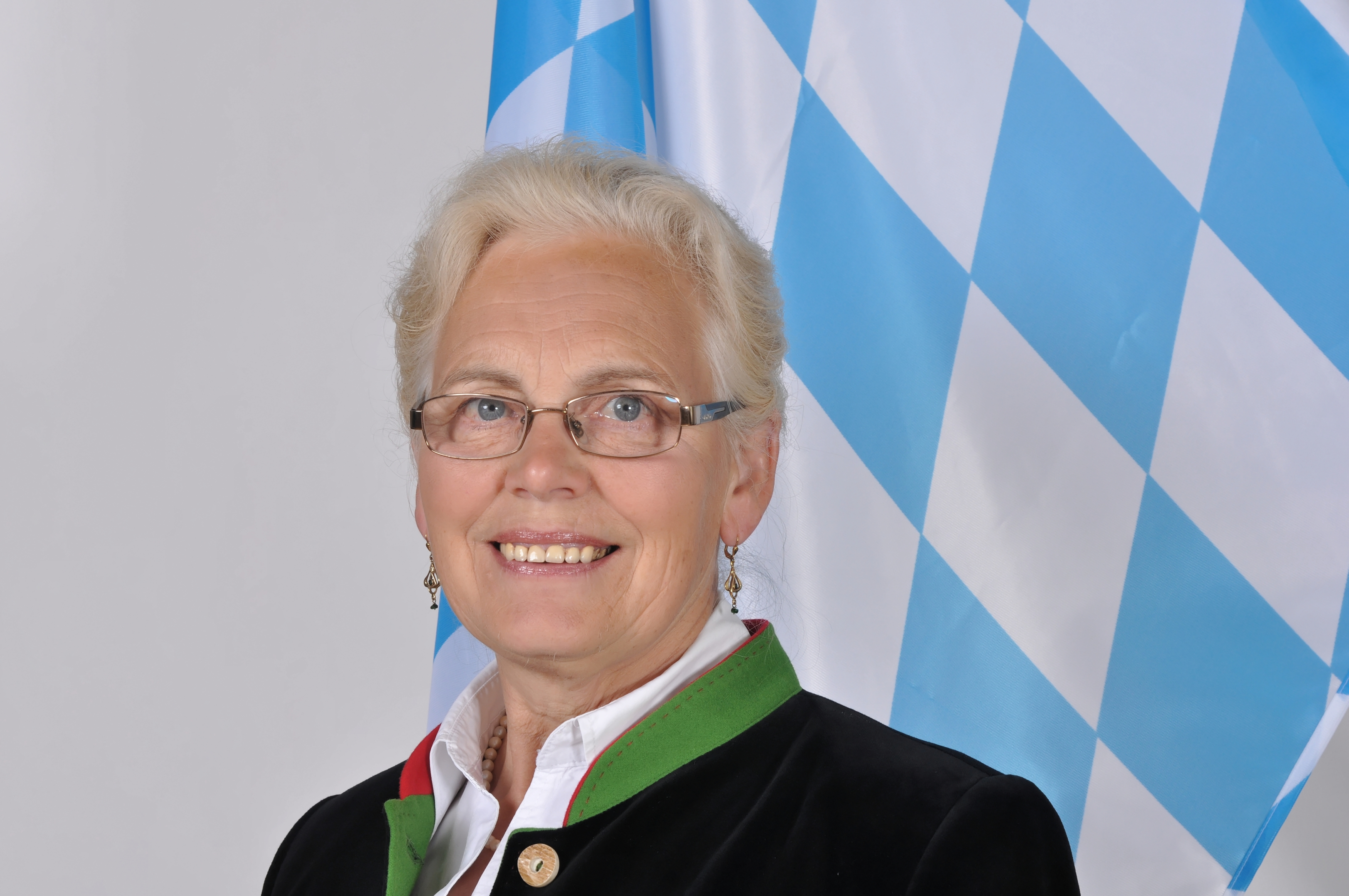 Landtagsprojekt Bayern